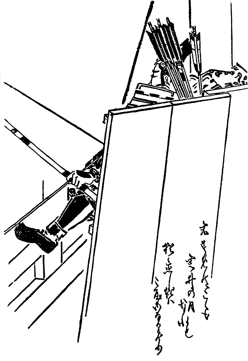 平行盛。平家の一門。平安時代末期 - 鎌倉時代初期の武将。／江戸時代『前賢故実』より。画：菊池容斎